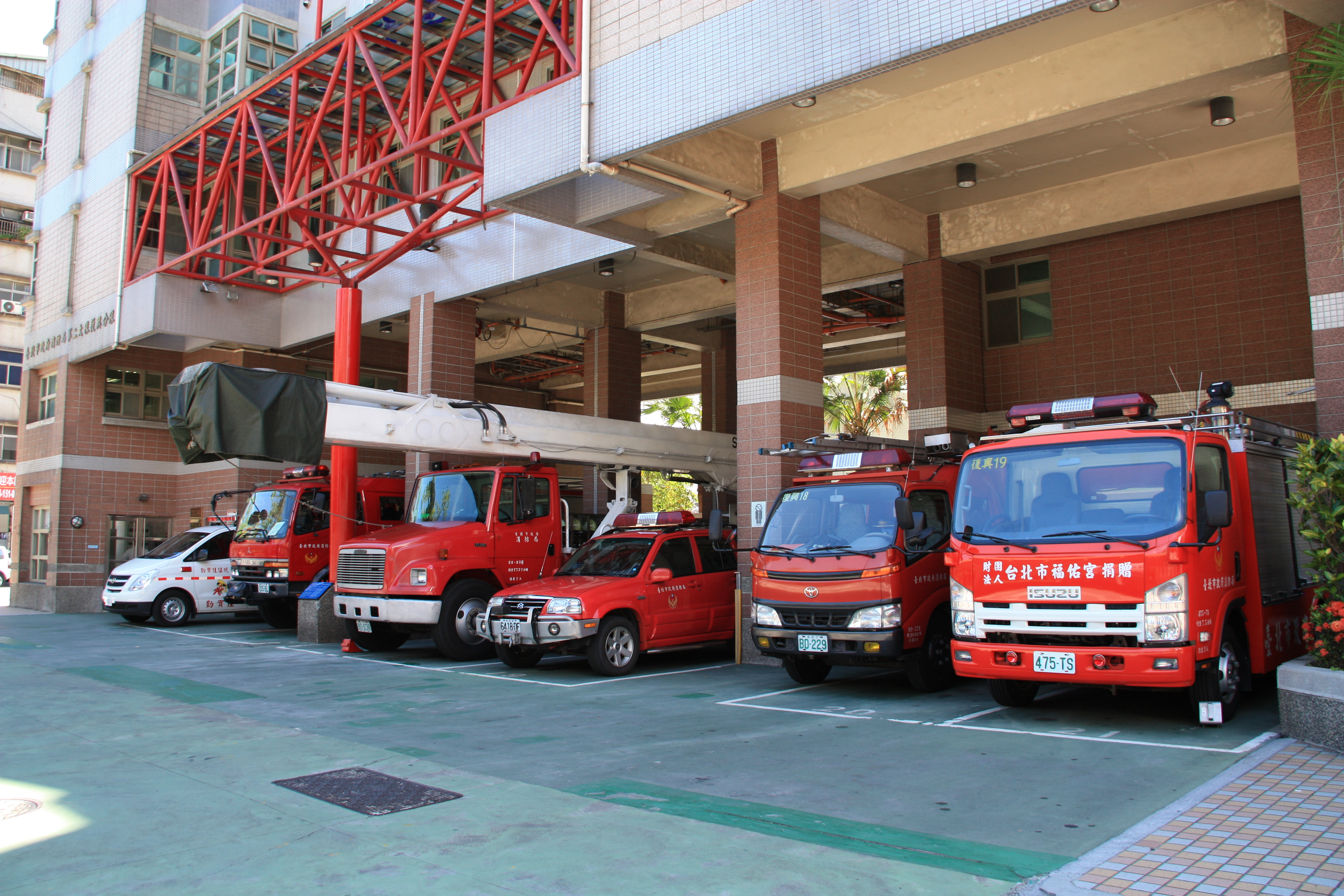 中文（台灣）: 臺北市政府消防局第二大隊復興分隊消防車庫。